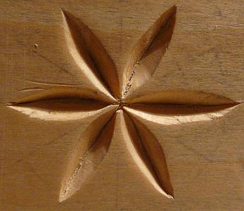 Kerbschnitt Rosette